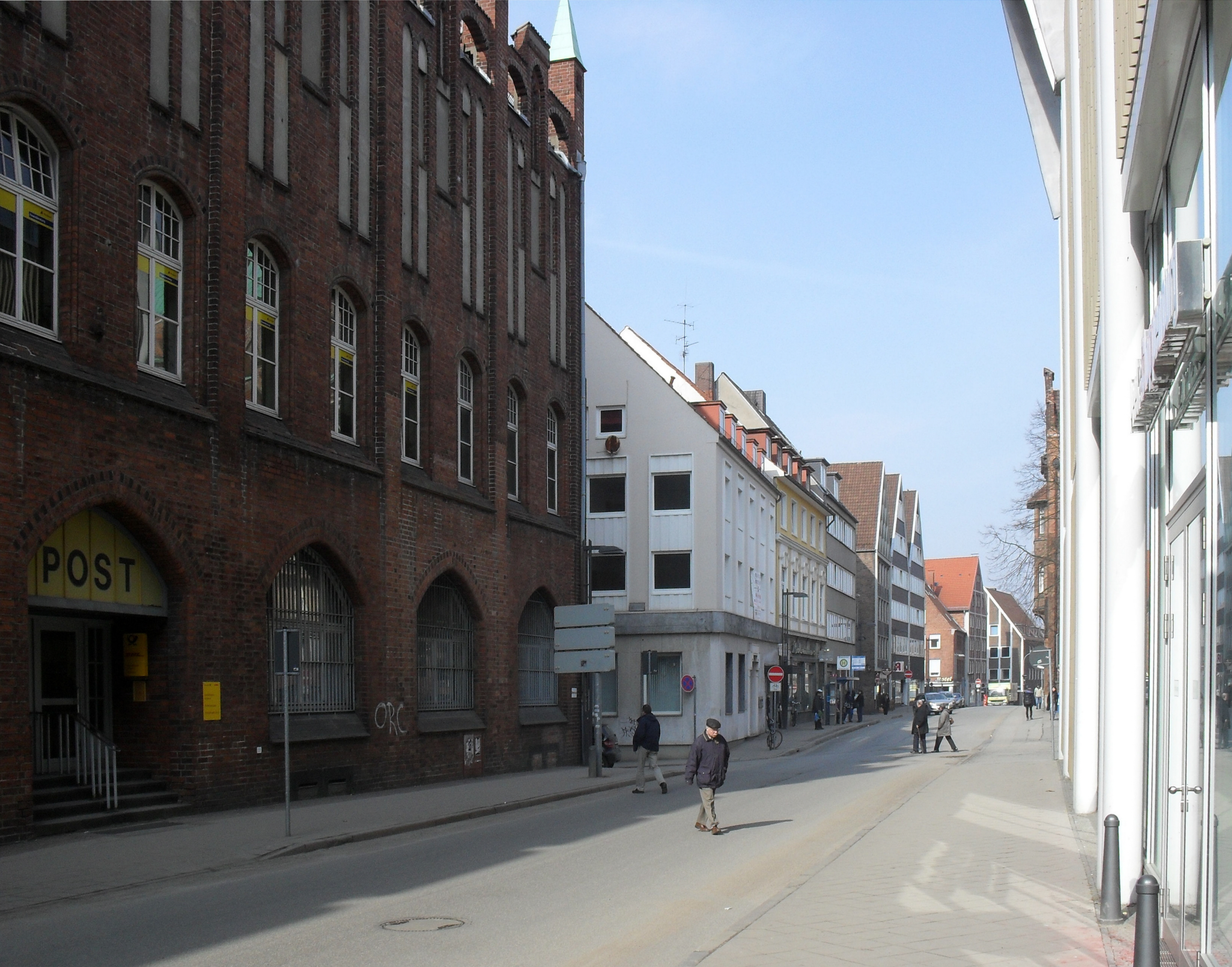 Der Schüsselbuden in Lübeck